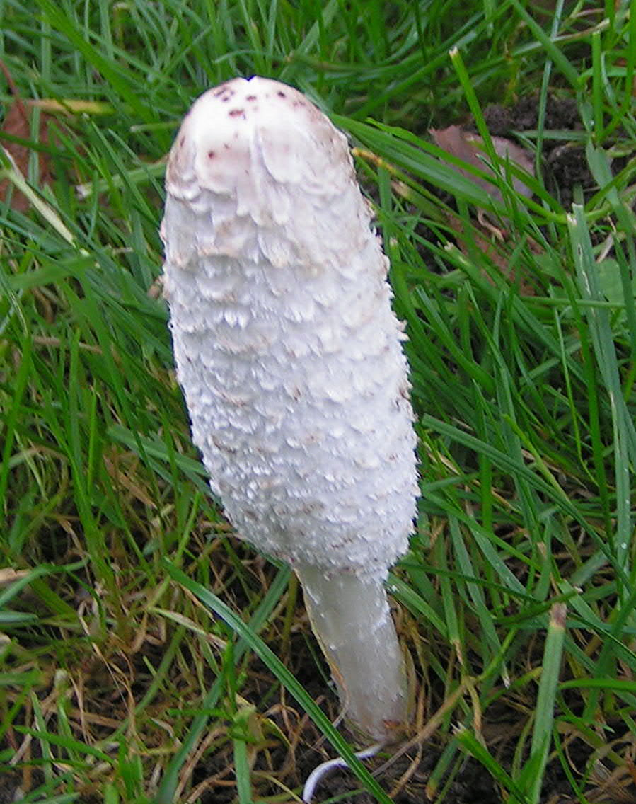 Geschubde inktzwam jong oktober 2004